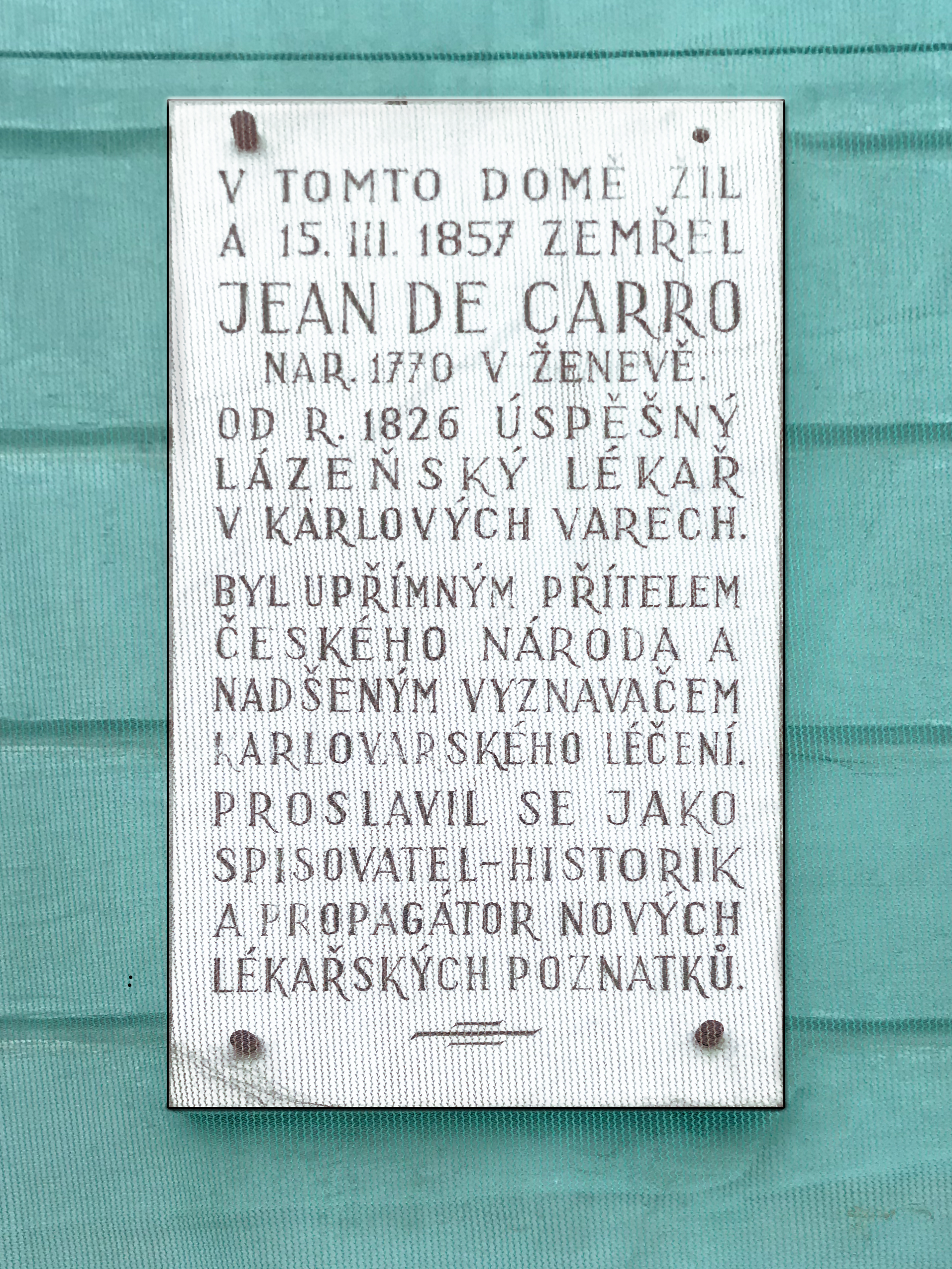 Pamětní deska na domě, ve kterém žil a zemřel lékař Jean de Carro – Karlovy Vary, Pod Jelením skokem 399/18